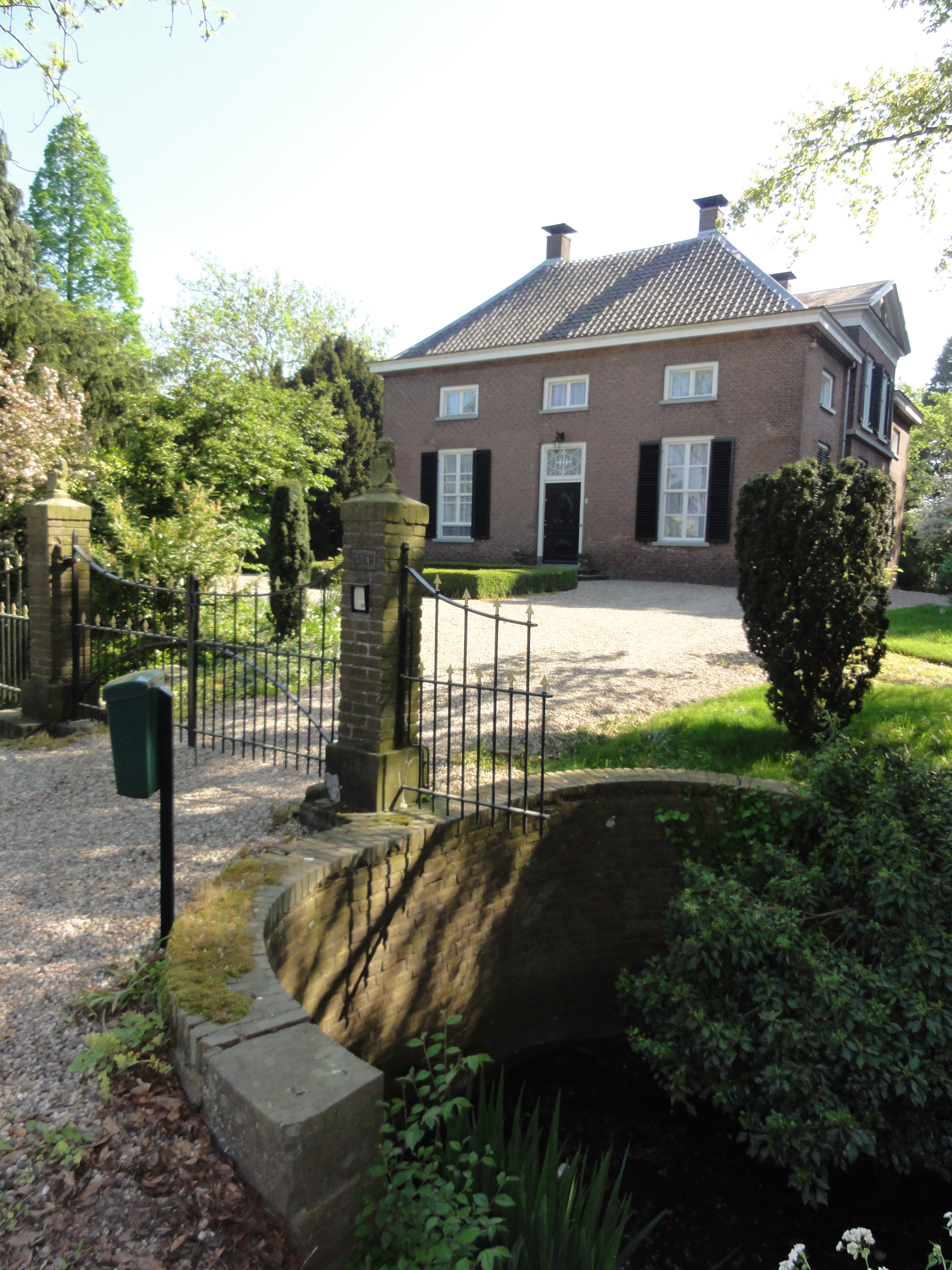 Dodewaard